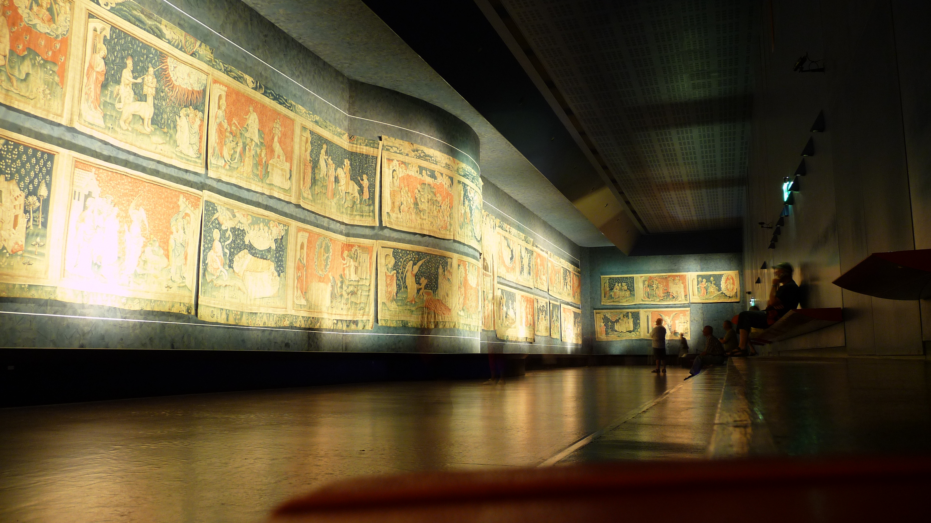 Galerie de l'Apocalypse dans le château d'Angers